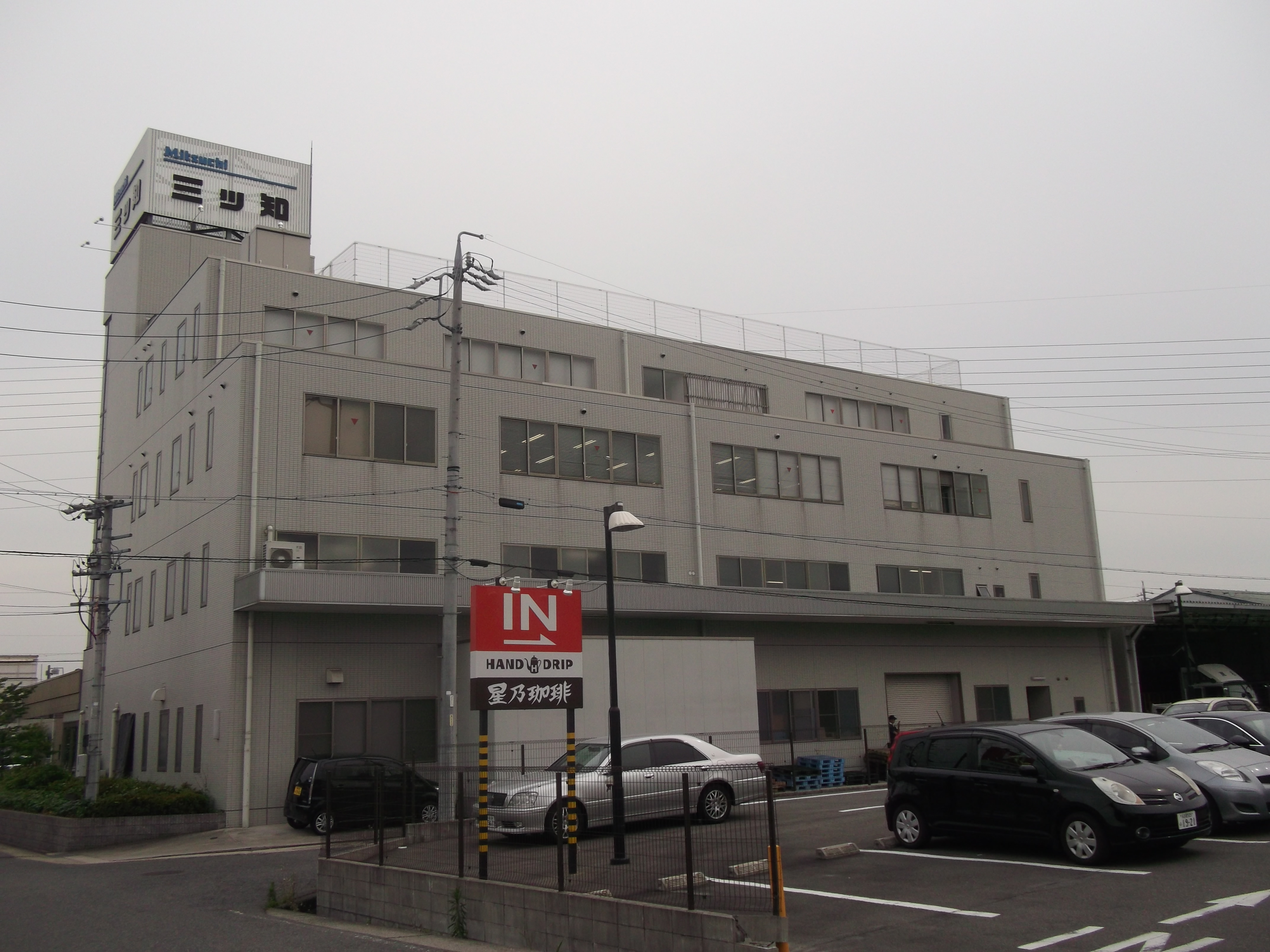 名古屋市守山区薮田町の三ツ知本社を東側公道北側より撮影